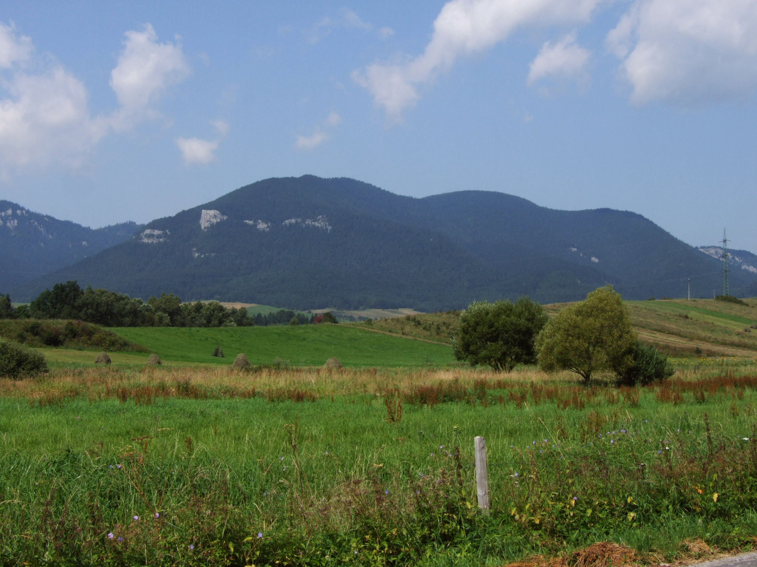 Czerenowa i Łomy. Widok z Prosieka